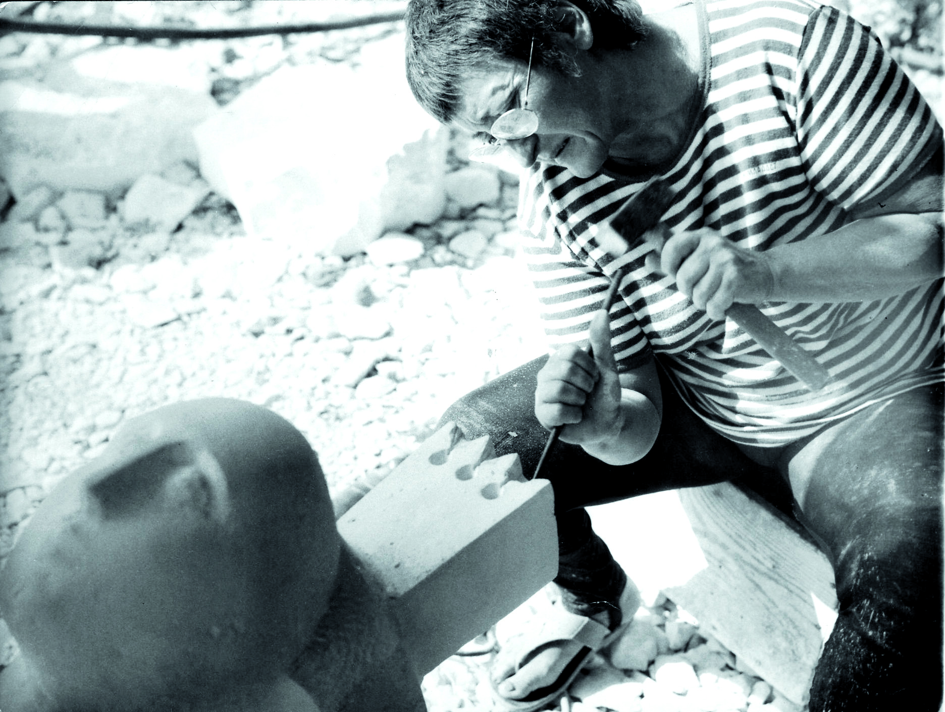 Simpozionul de piatra, Burgas/Bulgaria